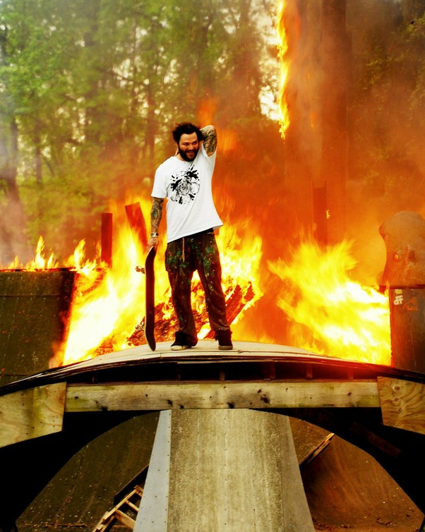 Bam en una presentación de Skateboarding